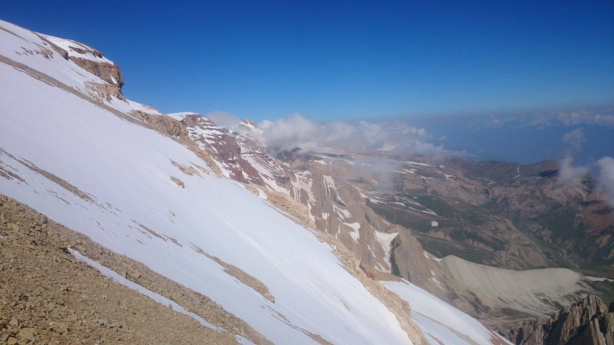 Bazaryurd buzlağı